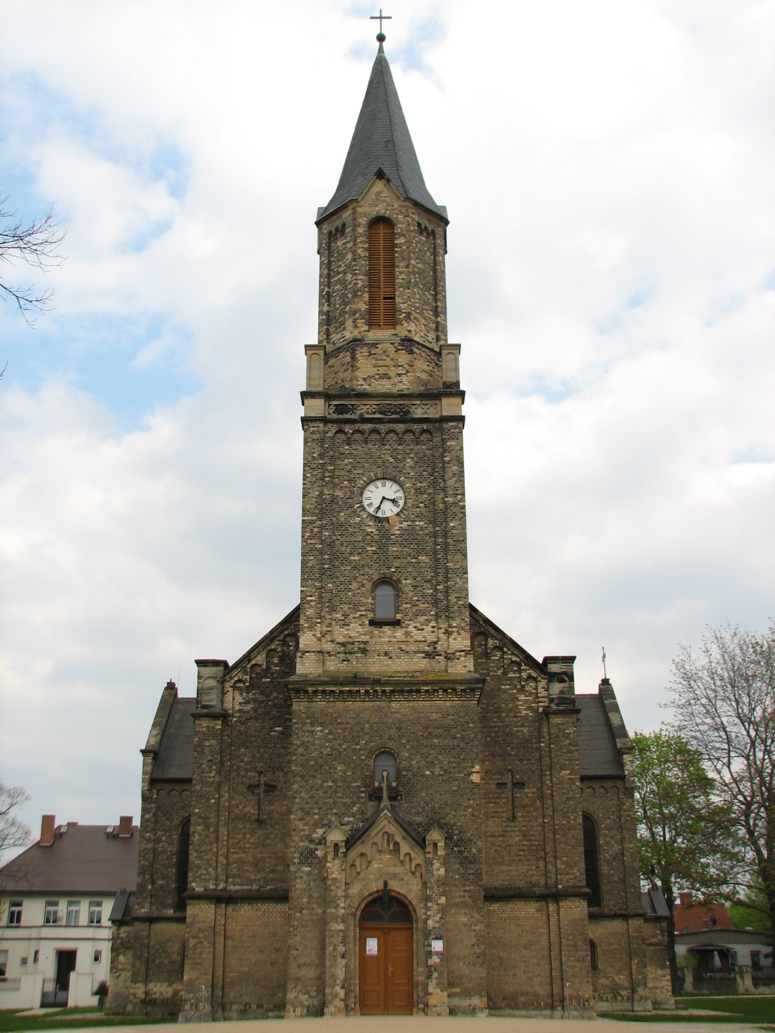 Kirche zu Leopoldshall, Foto vom April 2019